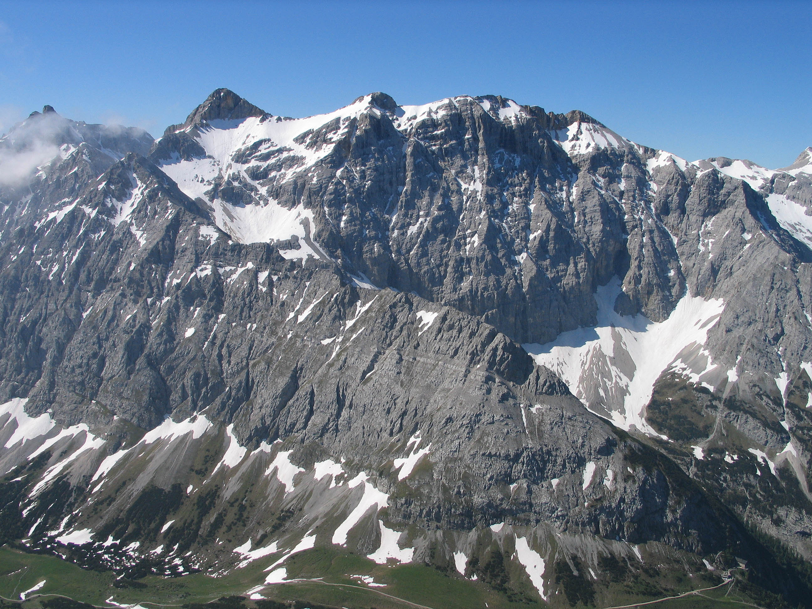 Birkkarspitze von der Grabenkarspitze, Karwendel Photograph: Luidger (19. Juni 2005)